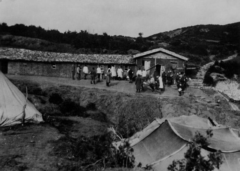 Ein türkisches Lazarett in den Dünenstellungen von Gallipoli.